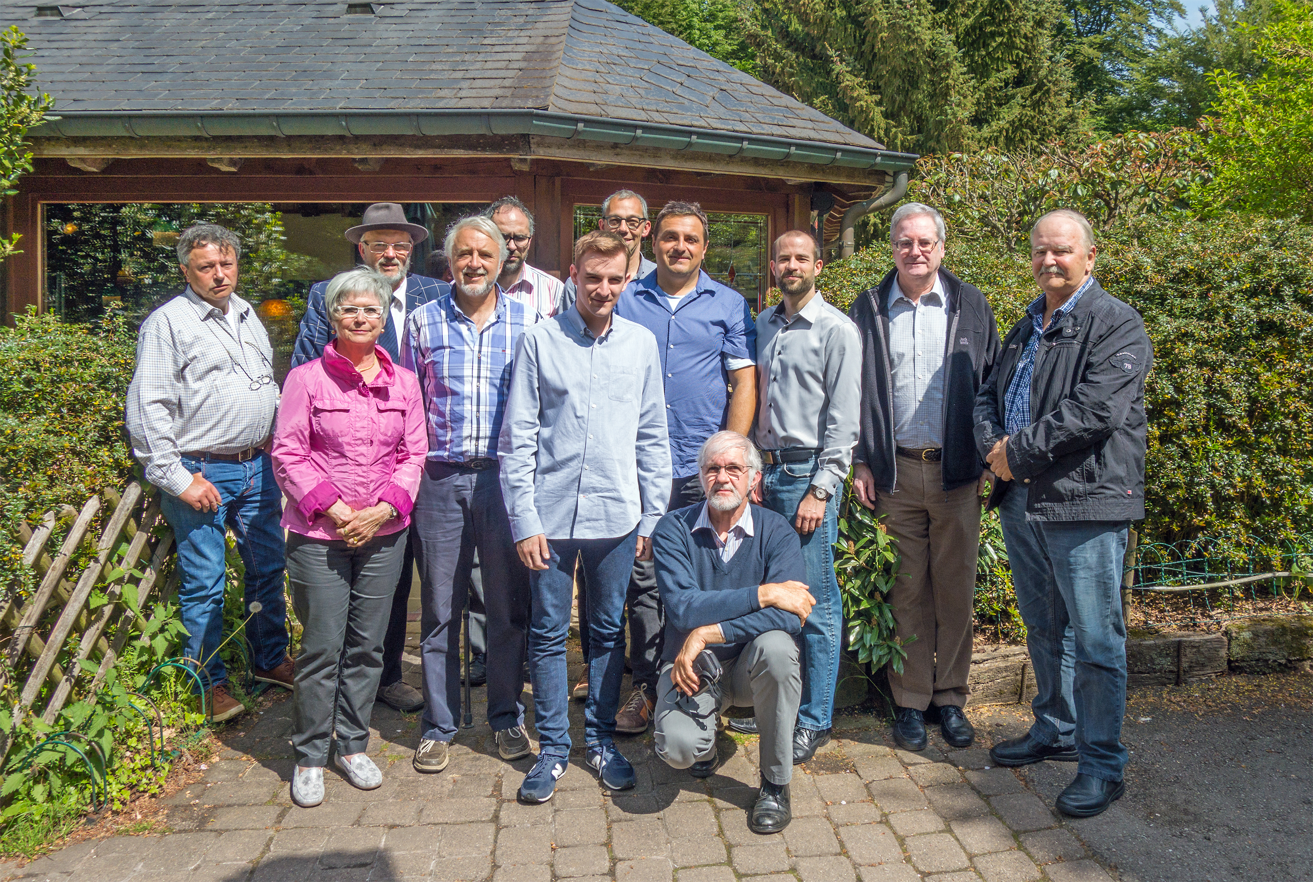 Wiki-Treffen am Juegdschlass, den 21. Mee 2016